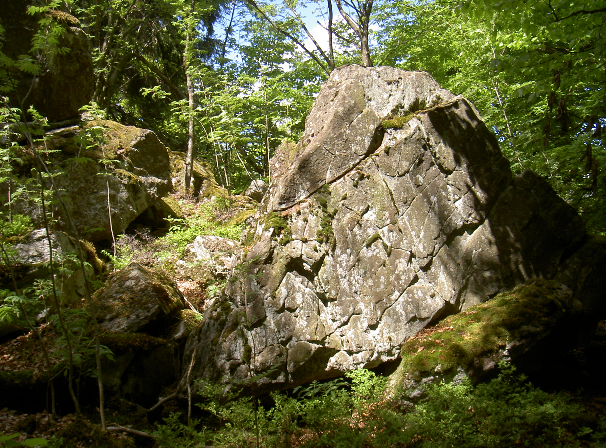 Weingartenfels